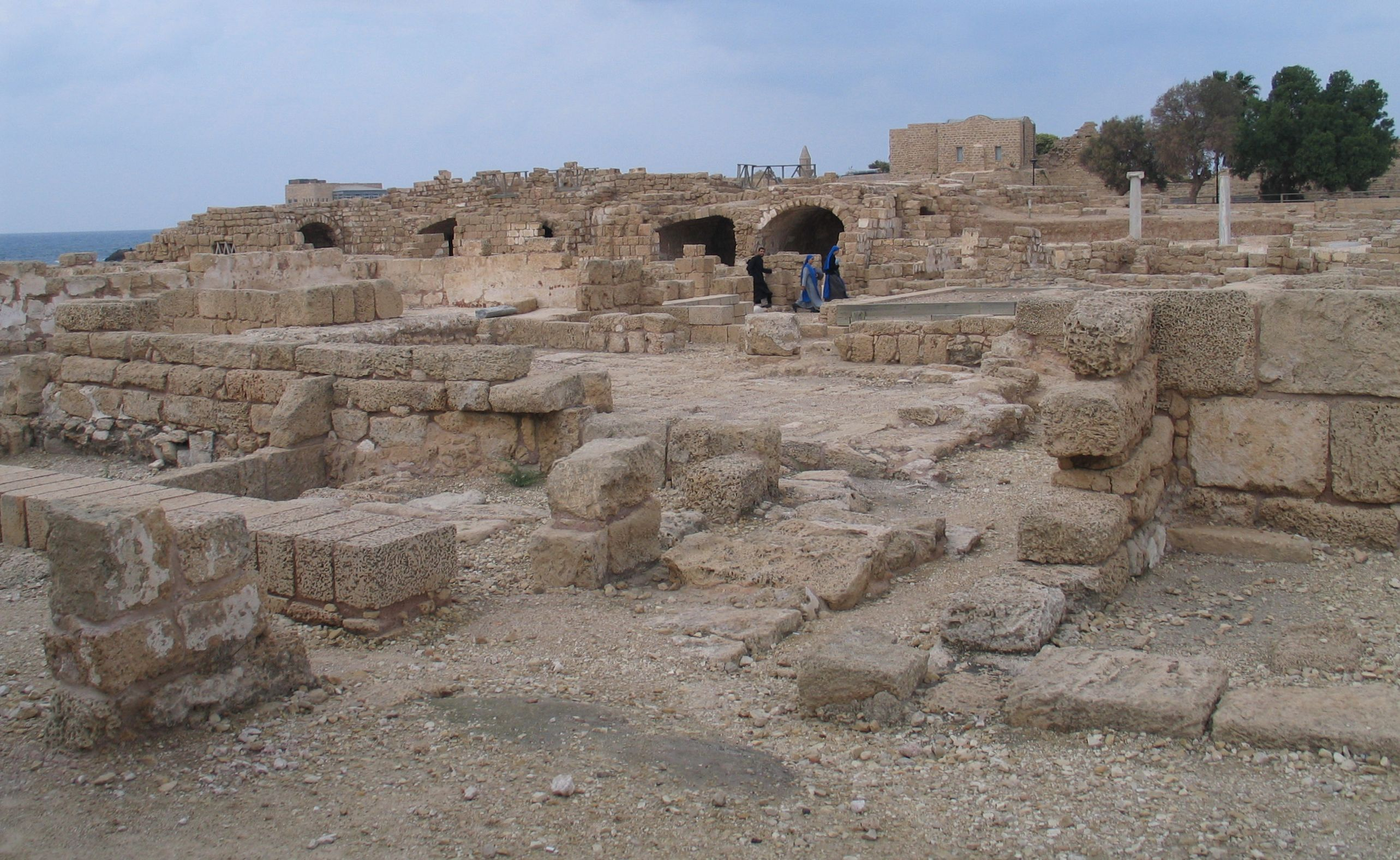 Caesarea Maritima, Israel.